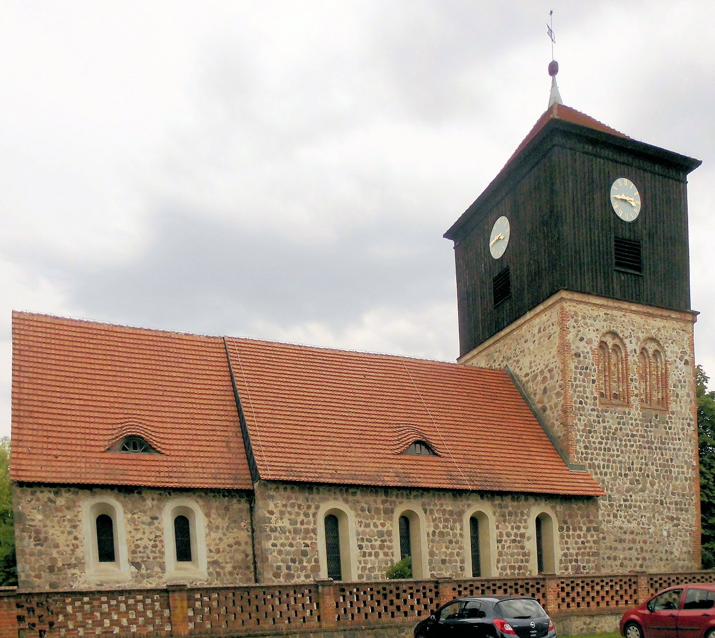 Dorfkirche in Lichterfelde, Gemeinde Schorfheide, Landkreis Barnim, Deutschland